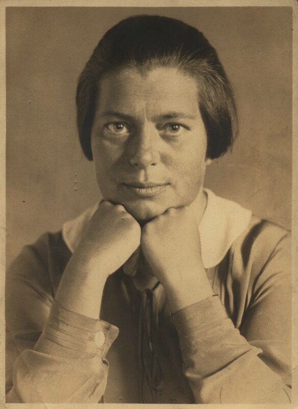 Josephine Dellisch (1891–1970), österreichische Gymnasiallehrerin für Deutsch und Französisch, unterrichtete um 1914/15 am Mädchen-Lyzeum in Mödling und 1922 bis 1928 im reformpädagogischen Landerziehungsheim Freie Schulgemeinde Wickersdorf. Sie war mit Anna Freud, Alix und James Strachey befreundet und wirkte um 1918/20 in der Kanzlei des Berliner Psychoanalytischen Instituts mit.